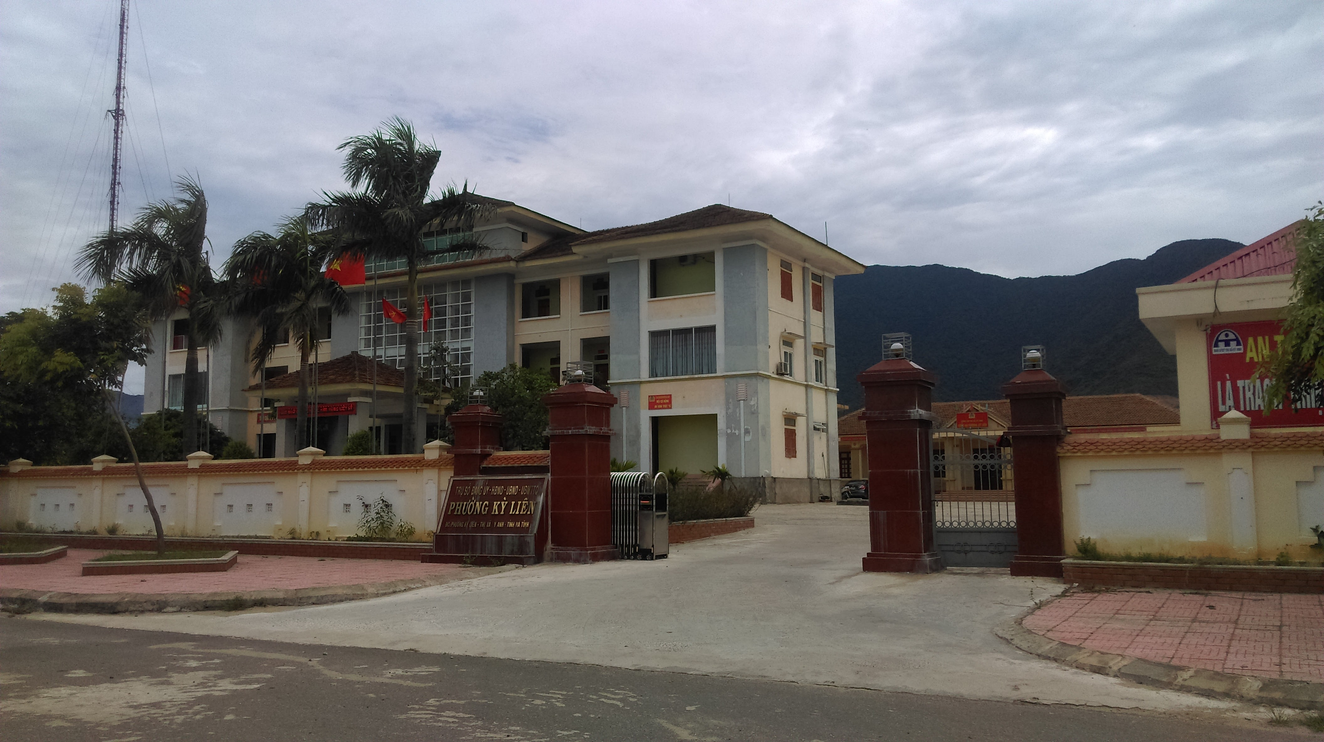 UBND phường Kỳ Liên, Kỳ Anh, Hà Tĩnh